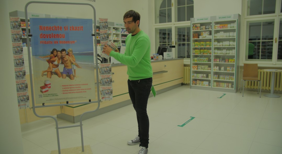 Indoor reklama v lékárnách EGER Marketing